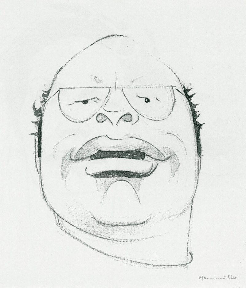 Karikaturzeichnung Wolfgang Reichmann